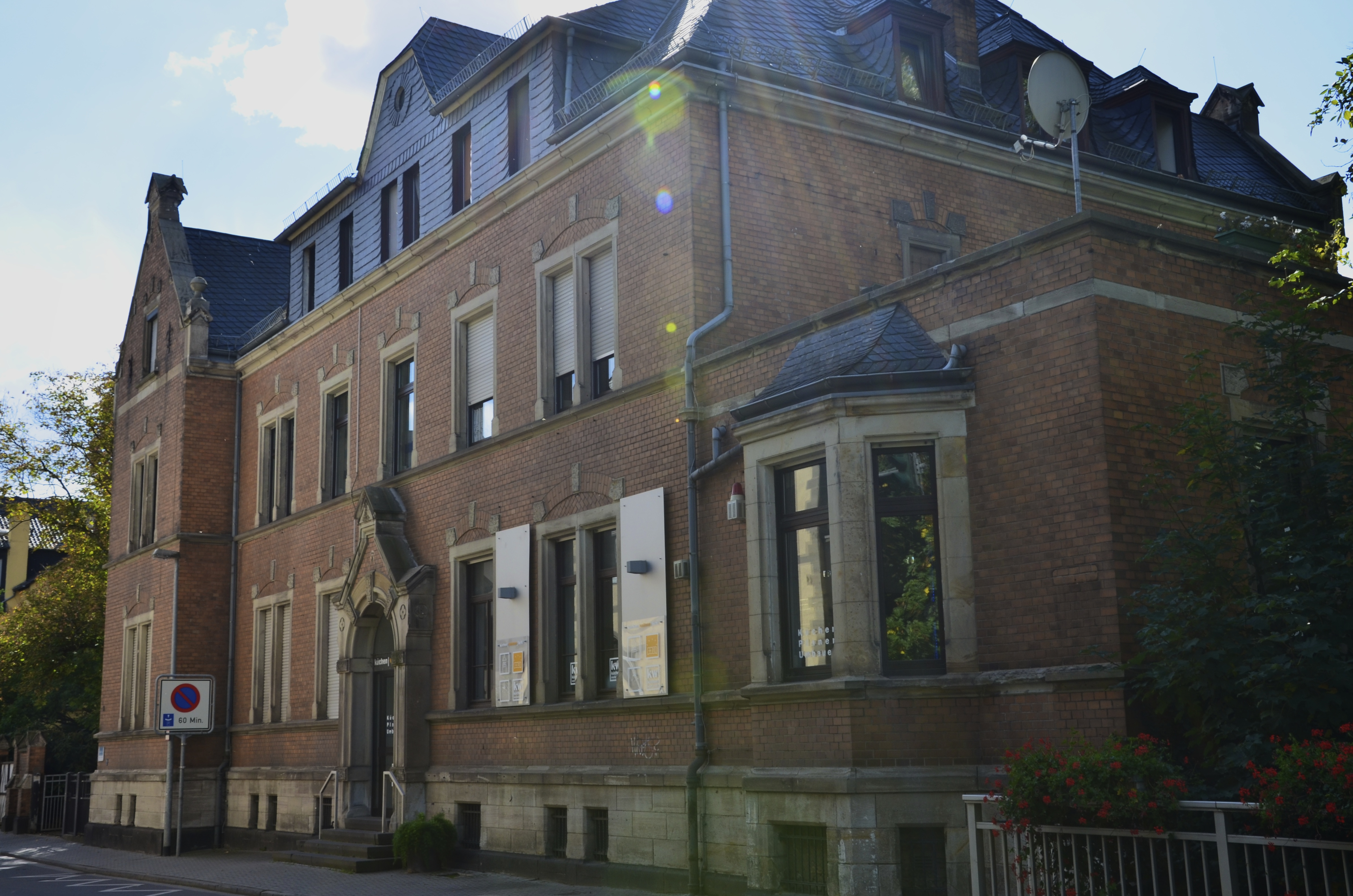 Schwerdstraße 18: ehemaliges Amtsgericht; gründerzeitlicher Klinkerbau, bezeichnet 1897